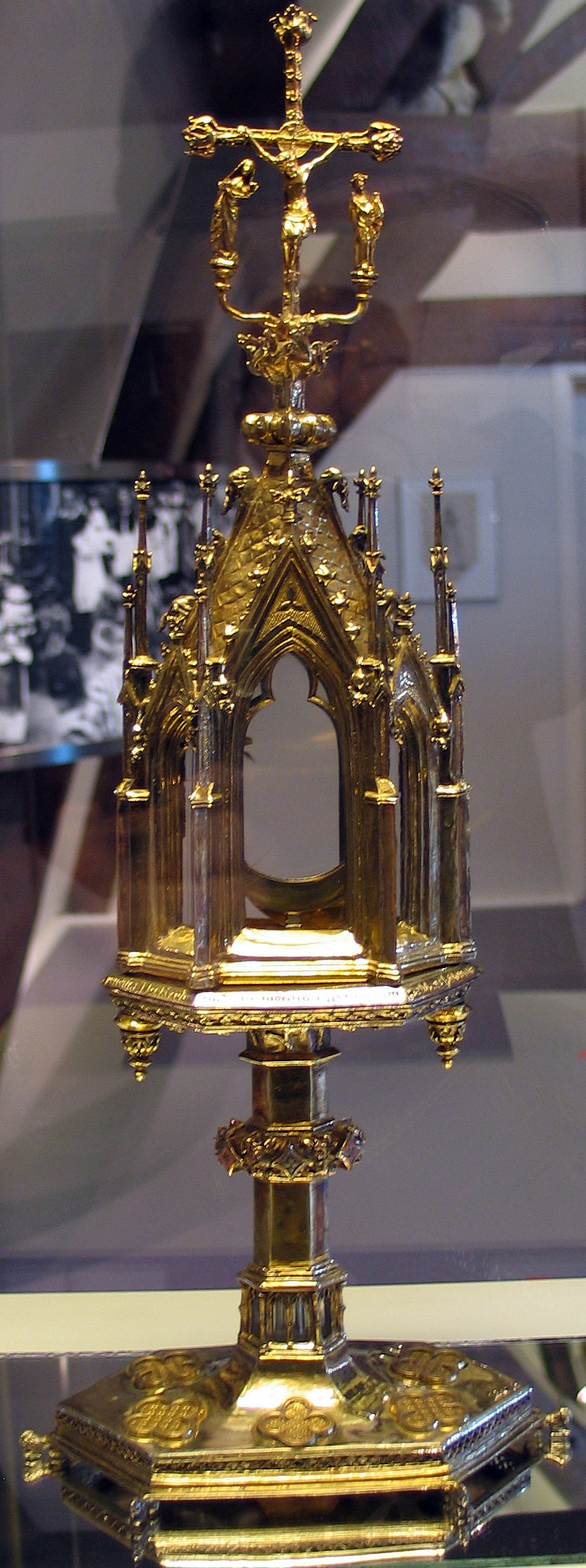 monstrans besteld in 1286 in Parijs door priorin Heilewigis van Diest (volgens de inscriptie op de monstrans), tentoongesteld in Het Stadmus te Hasselt, België. Hoogstwaarschijnlijk is zij dezelfde persoon als Aleidis van Diest (1281-1302) die uit archivarische bronnen bekend is.